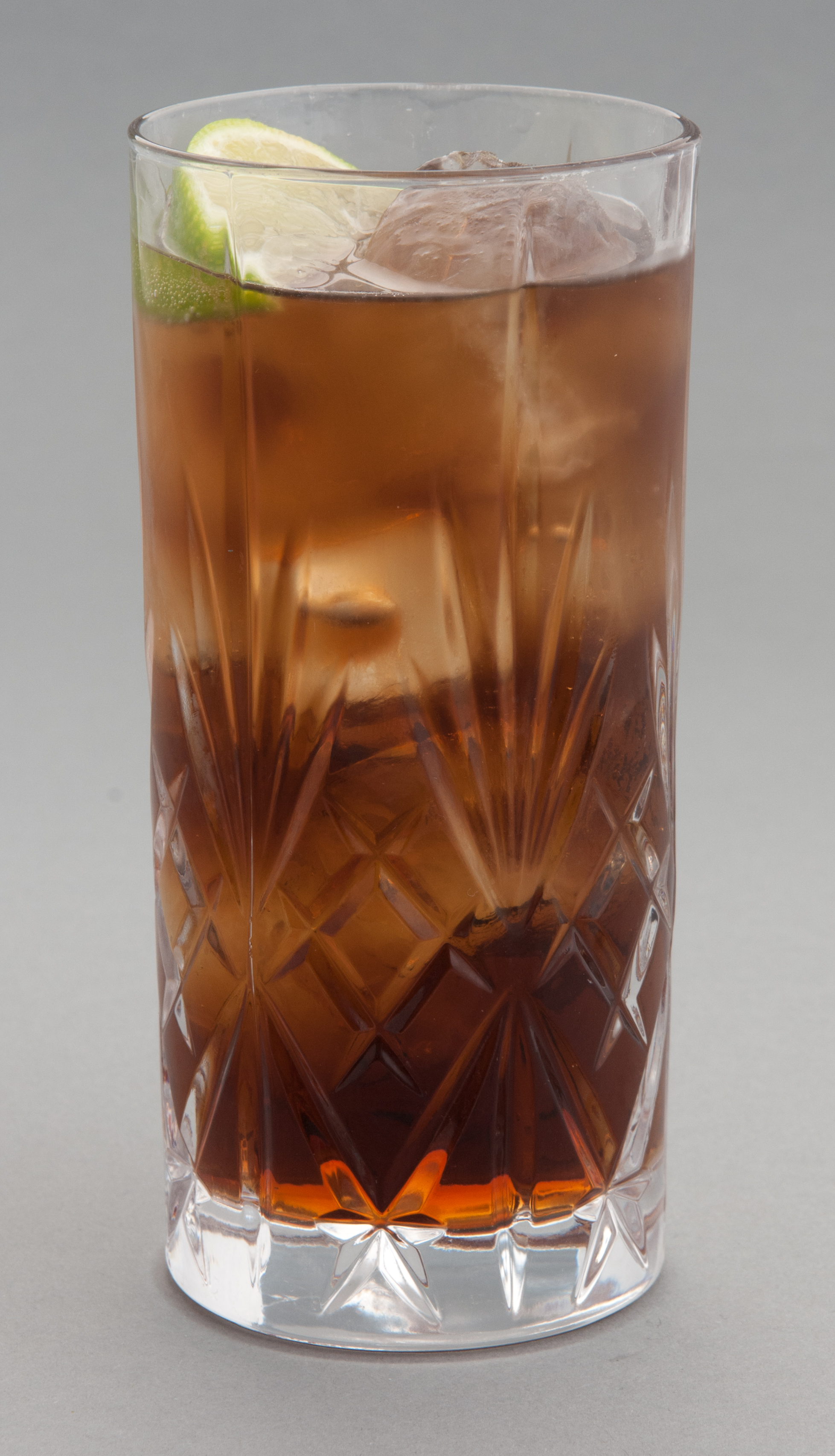 Cuba Libre